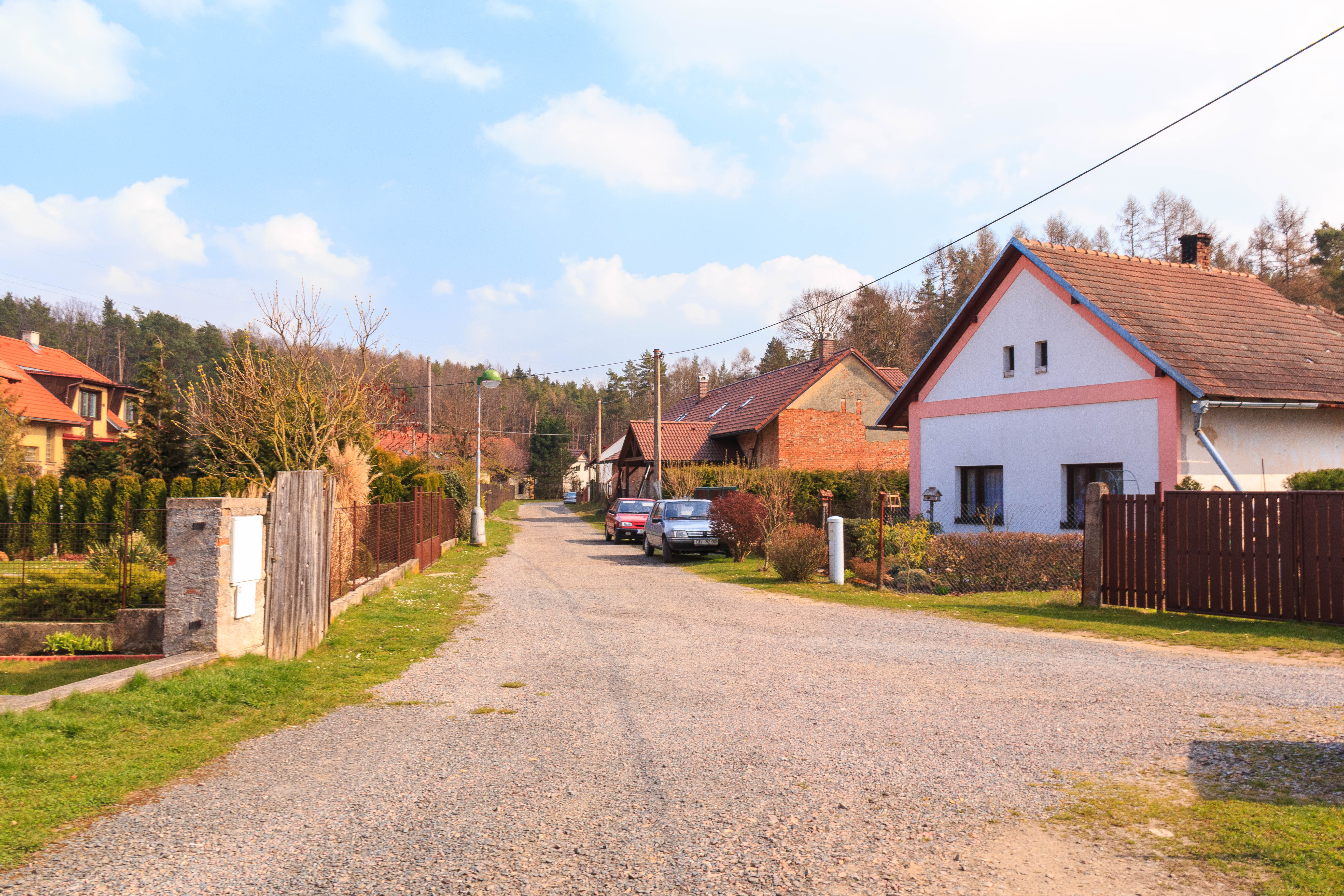 Studená Voda čp. 11